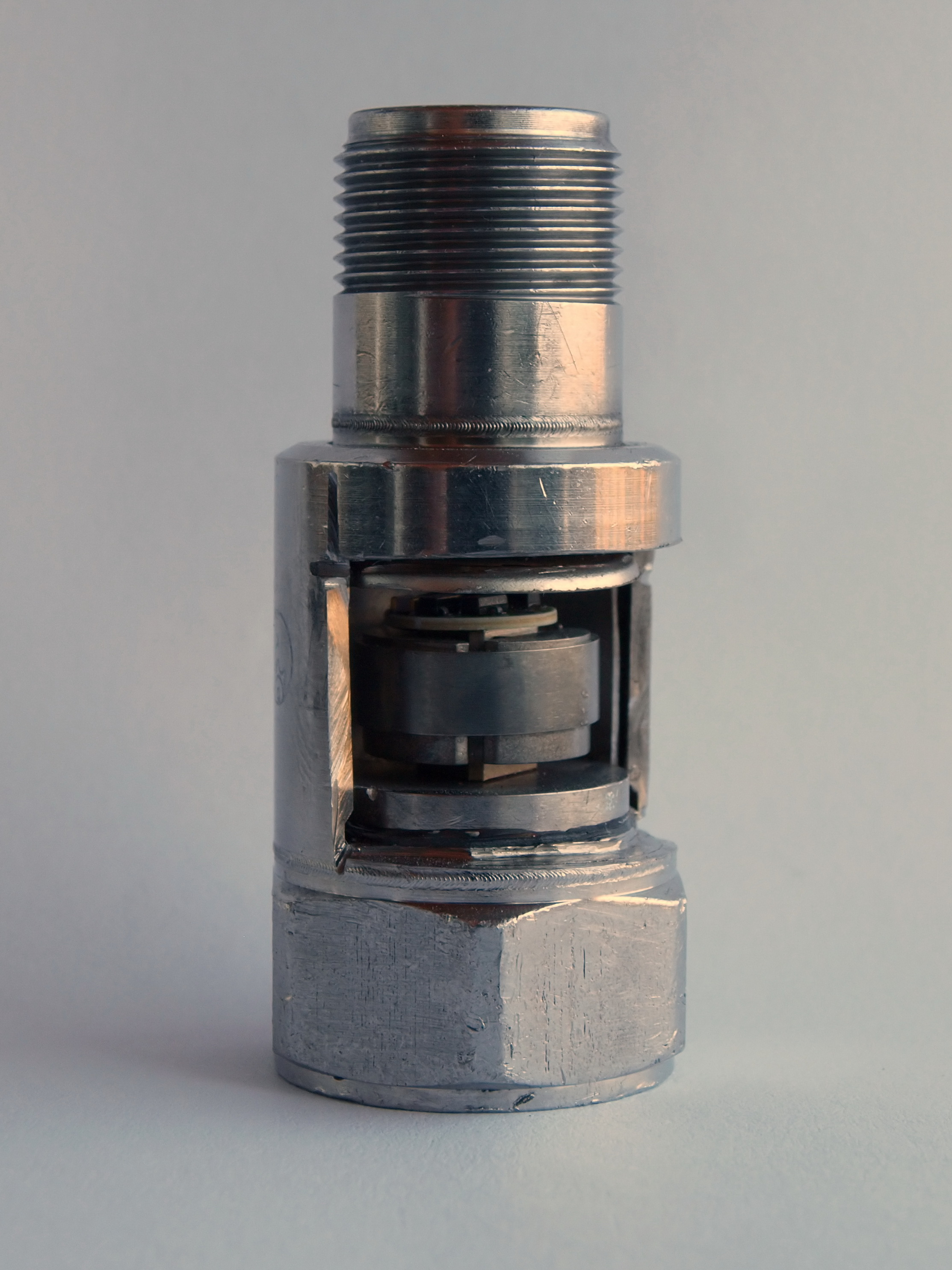 Acelerómetro piezoeléctrico de cuarzo. El corte de la cápsula permite visualizar el elemento piezoeléctrico (al centro) con las masas adheridas alrededor y el circuito electrónico en su parte superior.